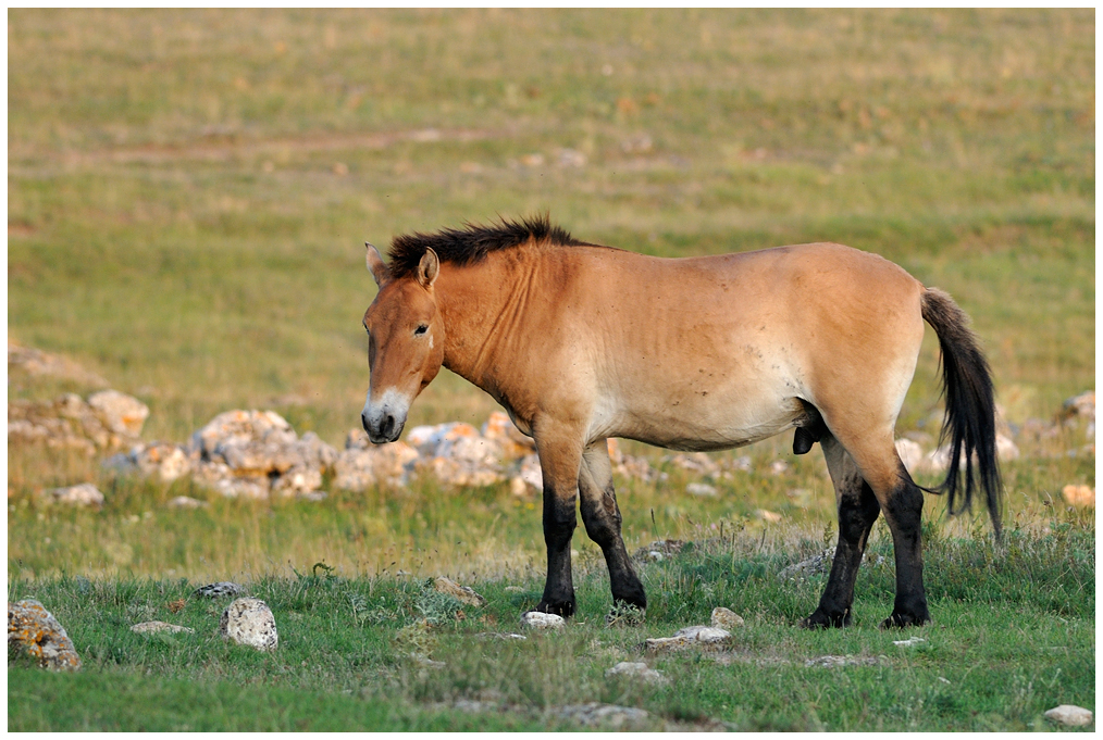 Equus przewalskii (Causse méjean, Lozère - France)